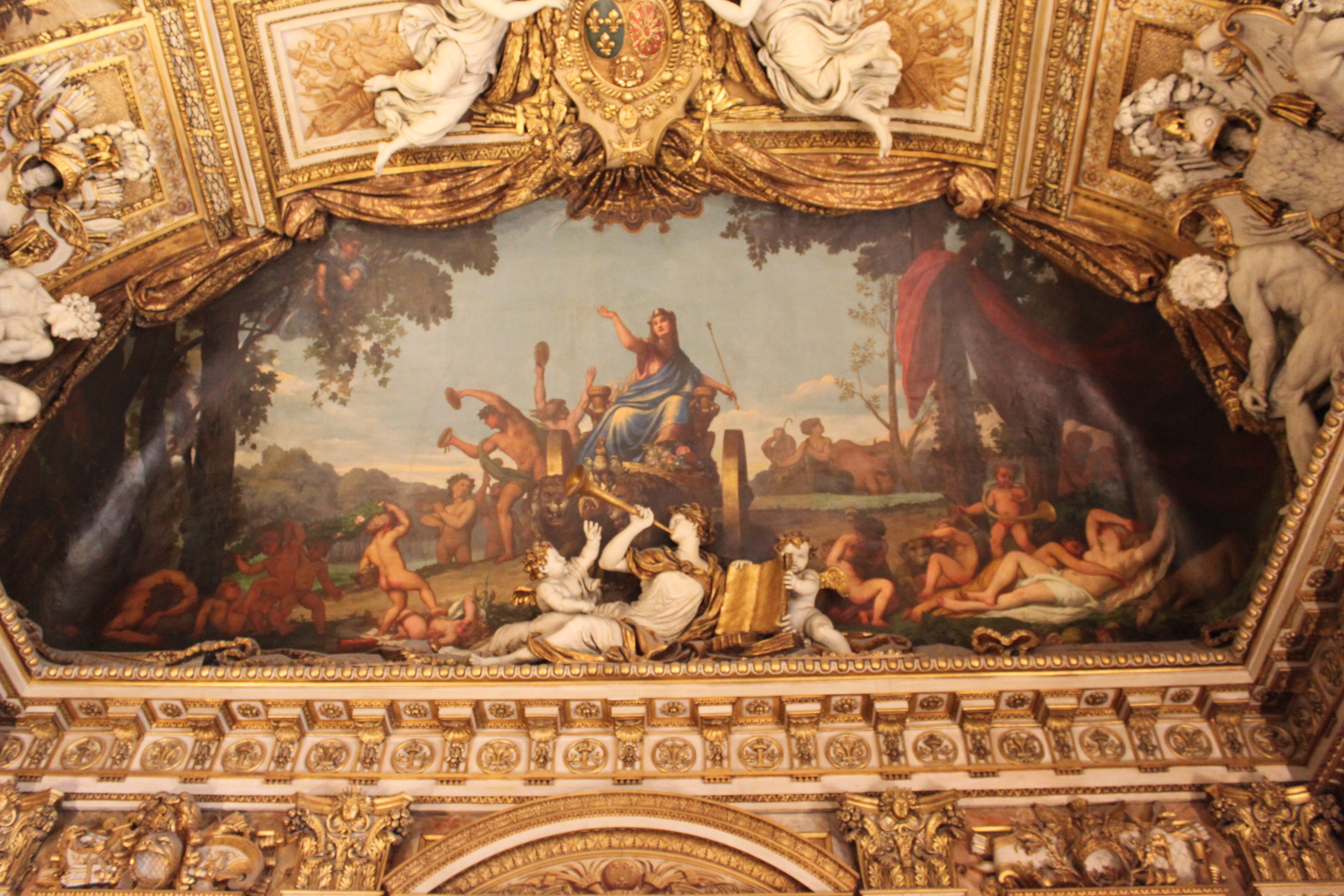 Titres possibles : Le Triomphe de la Terre ou Le Triomphe de Cybèle (1850) de Joseph-Benoît Guichard (1806-1880) Ce tableau avait été conçu par Lebrun pour l'extrémité Nord de la Galerie : Cybèle, déesse personnifiant la terre, est sur son char traîné par deux lions. C'est Joseph Guichard, qui compléta le compartiment vierge deux siècles plus tard en reprenant les indications laissées par Lebrun.